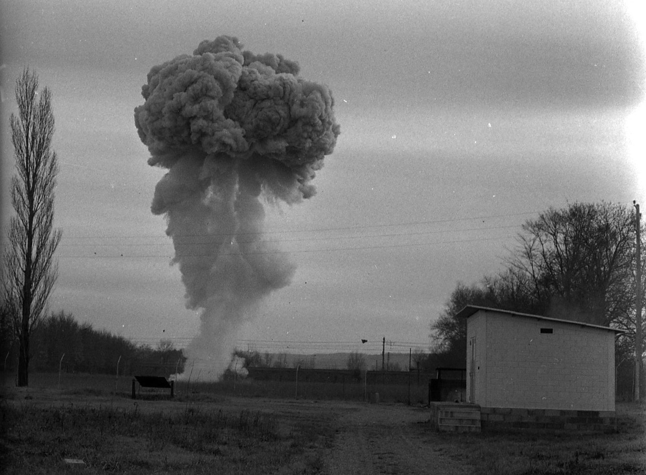 Le 22 janvier 1969, présentation dans les établissements Ruggieri, route de Revel, de la grenade à fusil fumigène de 50 mm Modèle 1954.